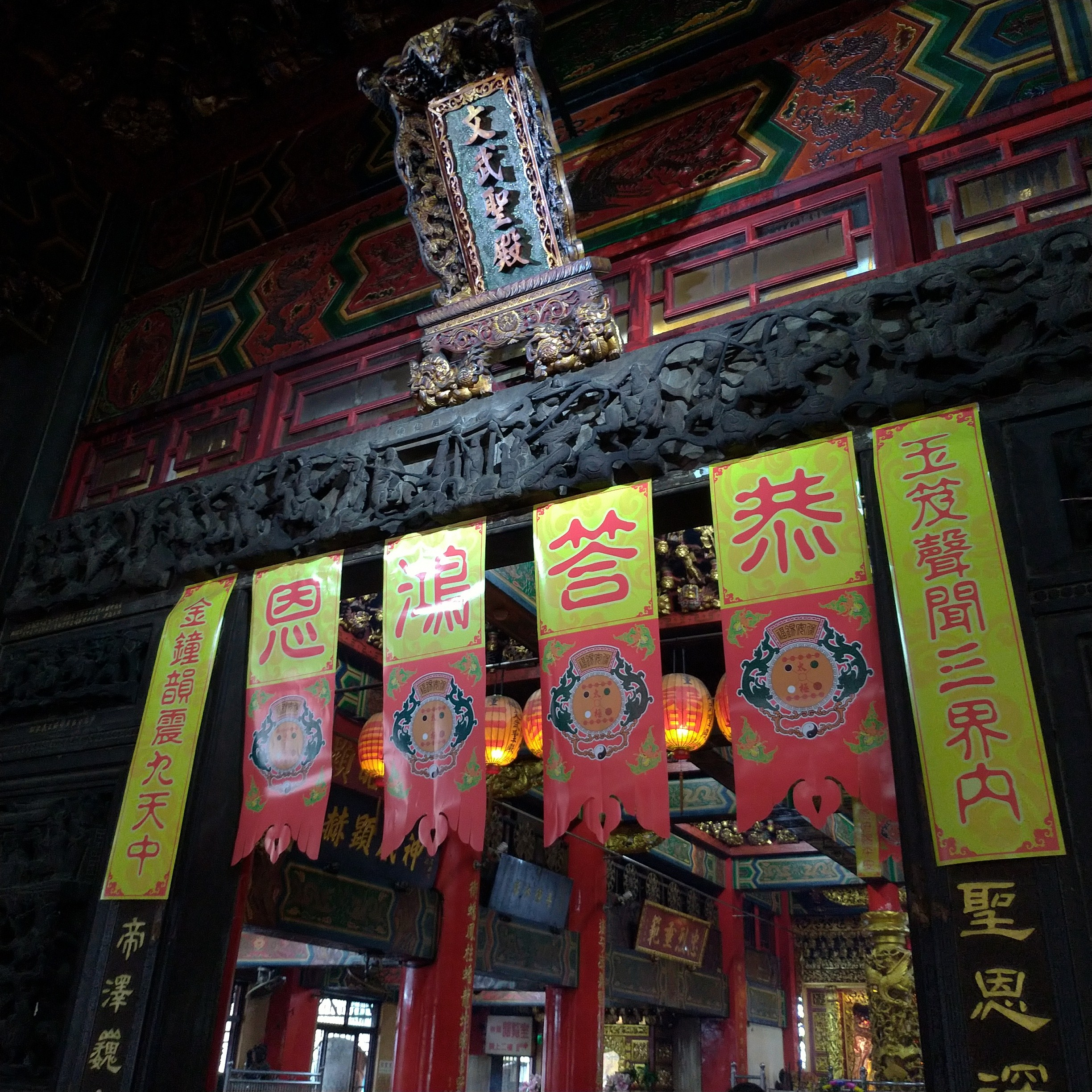 中文（台灣）: 文武聖殿廟匾；使用本圖片請遵循(CC 姓名標示-非商業性-禁止改作)，Please follow (CC BY-NC-ND 3.0 TW)